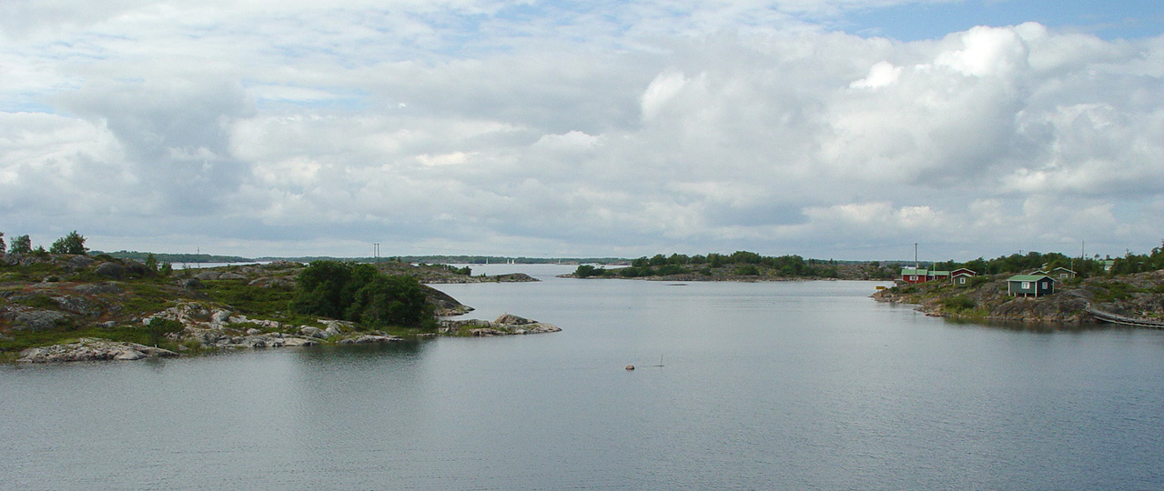 Åland: Ferry route Södra Linjen from Langnäs to Kökar